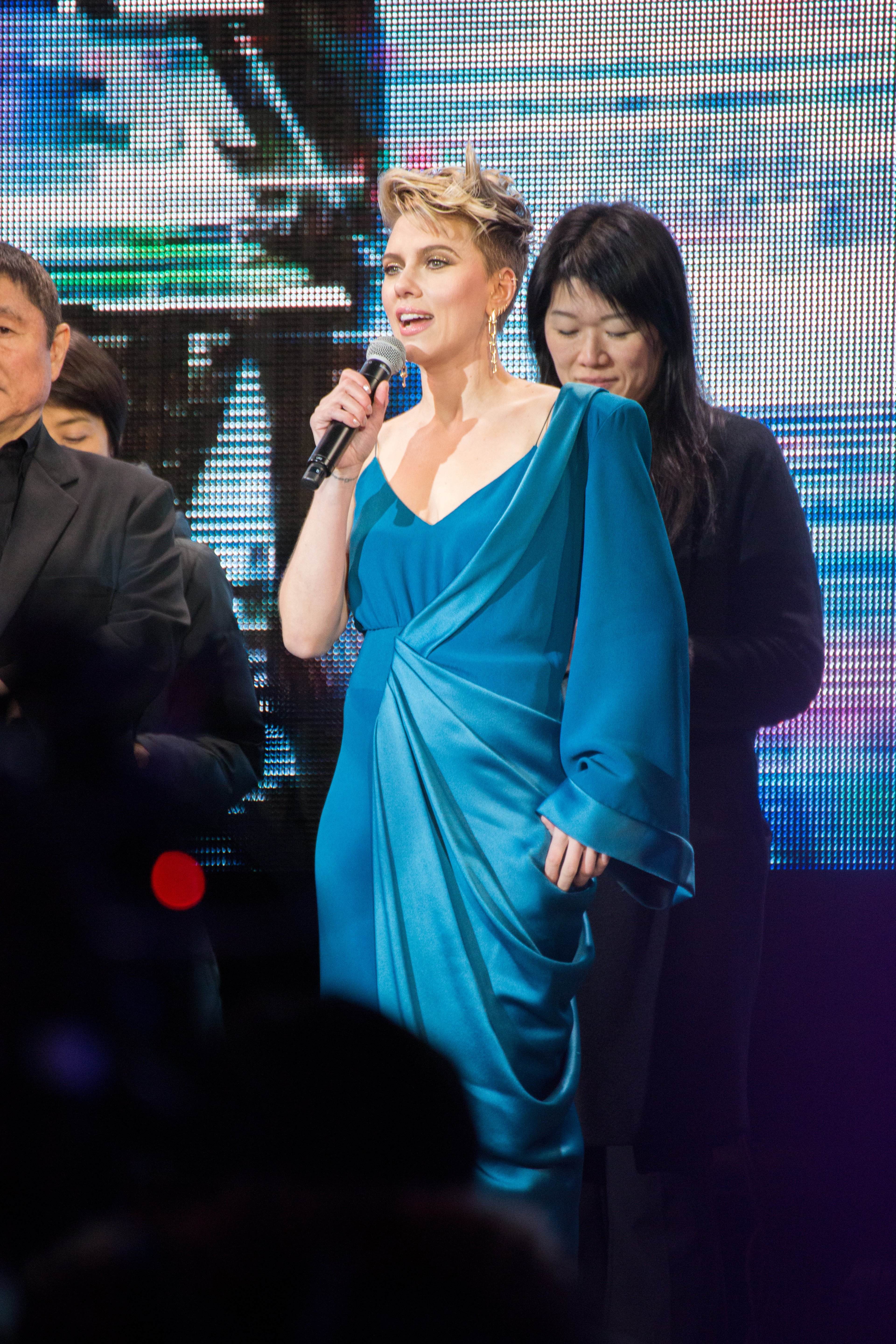 ゴースト・イン・ザ・シェル ワールドプレミアレッドカーペット スカーレット・ヨハンソン